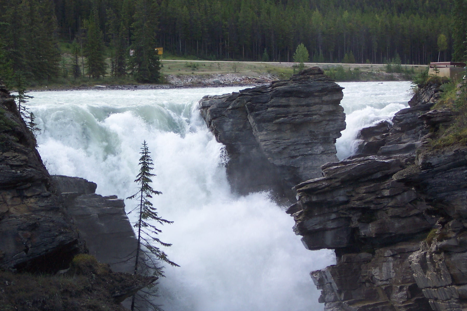 Canada Rocheuses les chutes Athabasca sur la rivière Athabasca, photo personnelle libre de droits